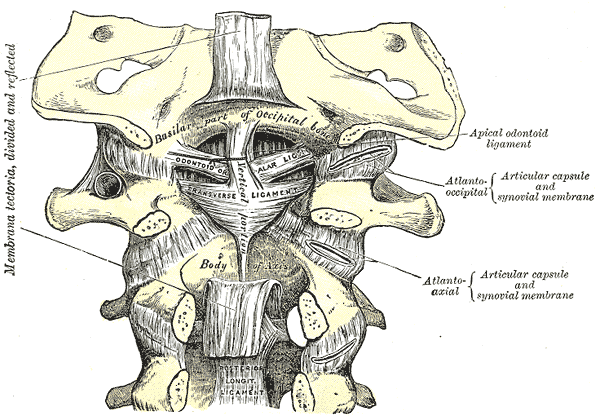 Membrana tectoria, transverse, and alar ligaments.